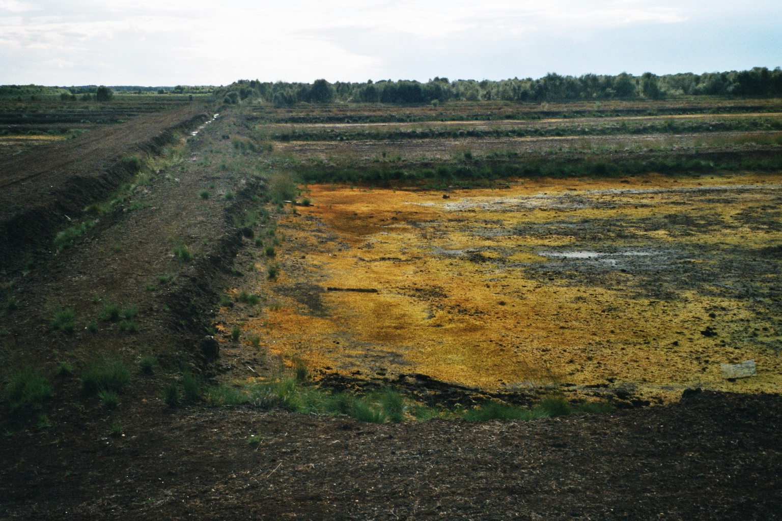 Blick in die Molberger Dose (Hochmoor) vom Moorlehrpfad, NSG „Molberger Dose“ im Gebiet von Molbergen